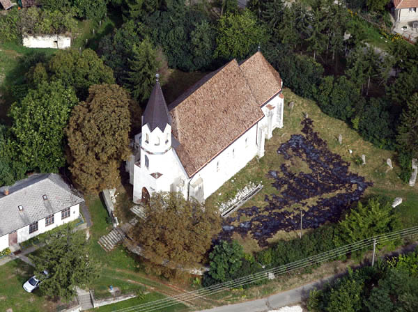 Református templom, Abaújvár